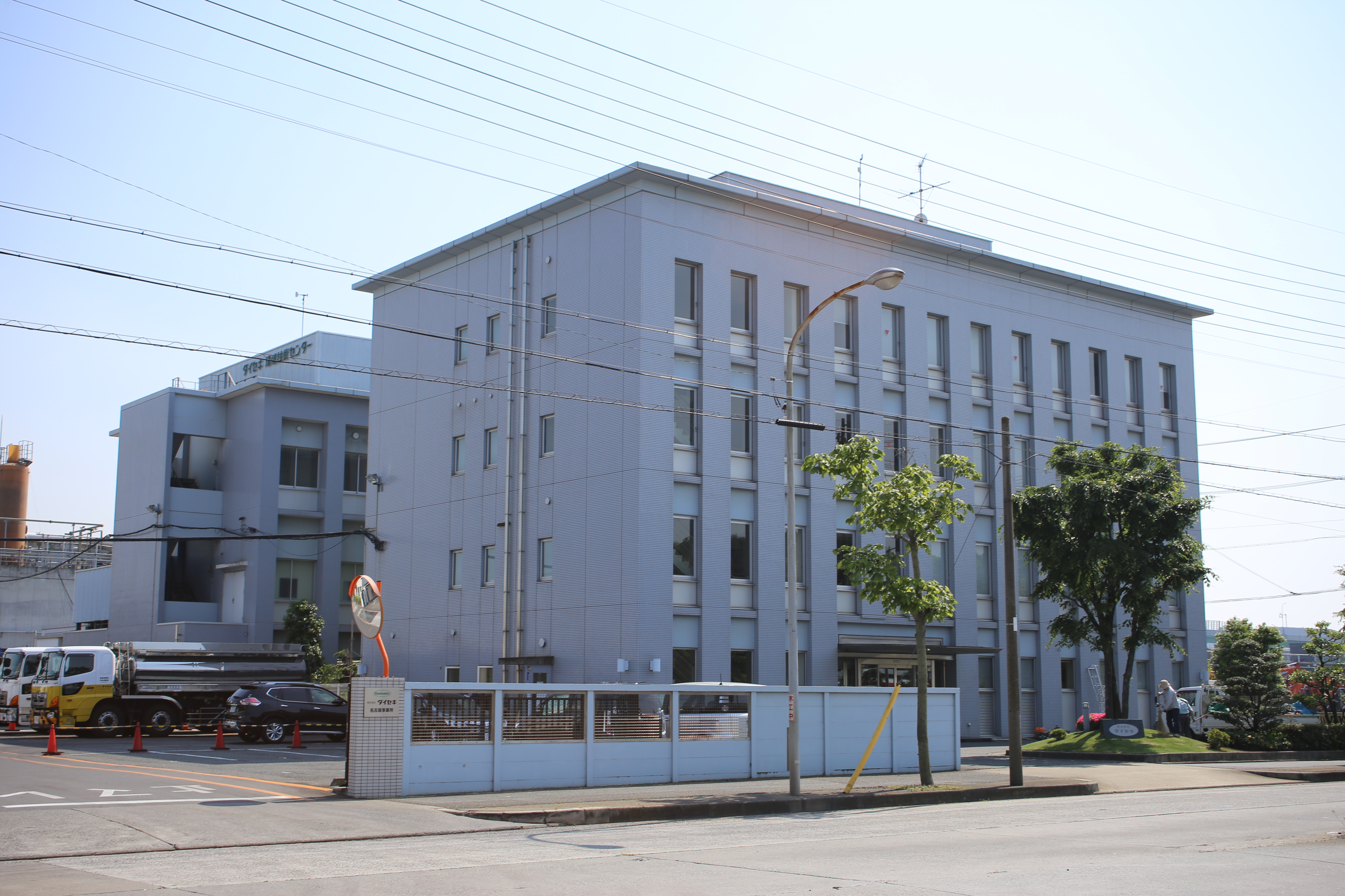 名古屋市港区船見町のダイセキ本社を北側公道東側より撮影